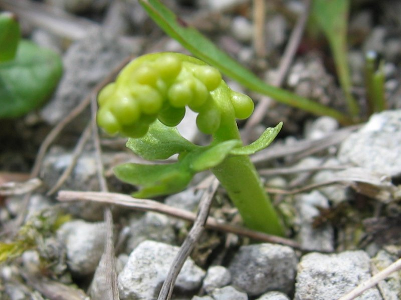 Mondraute Botrychium lunaria, Rügen